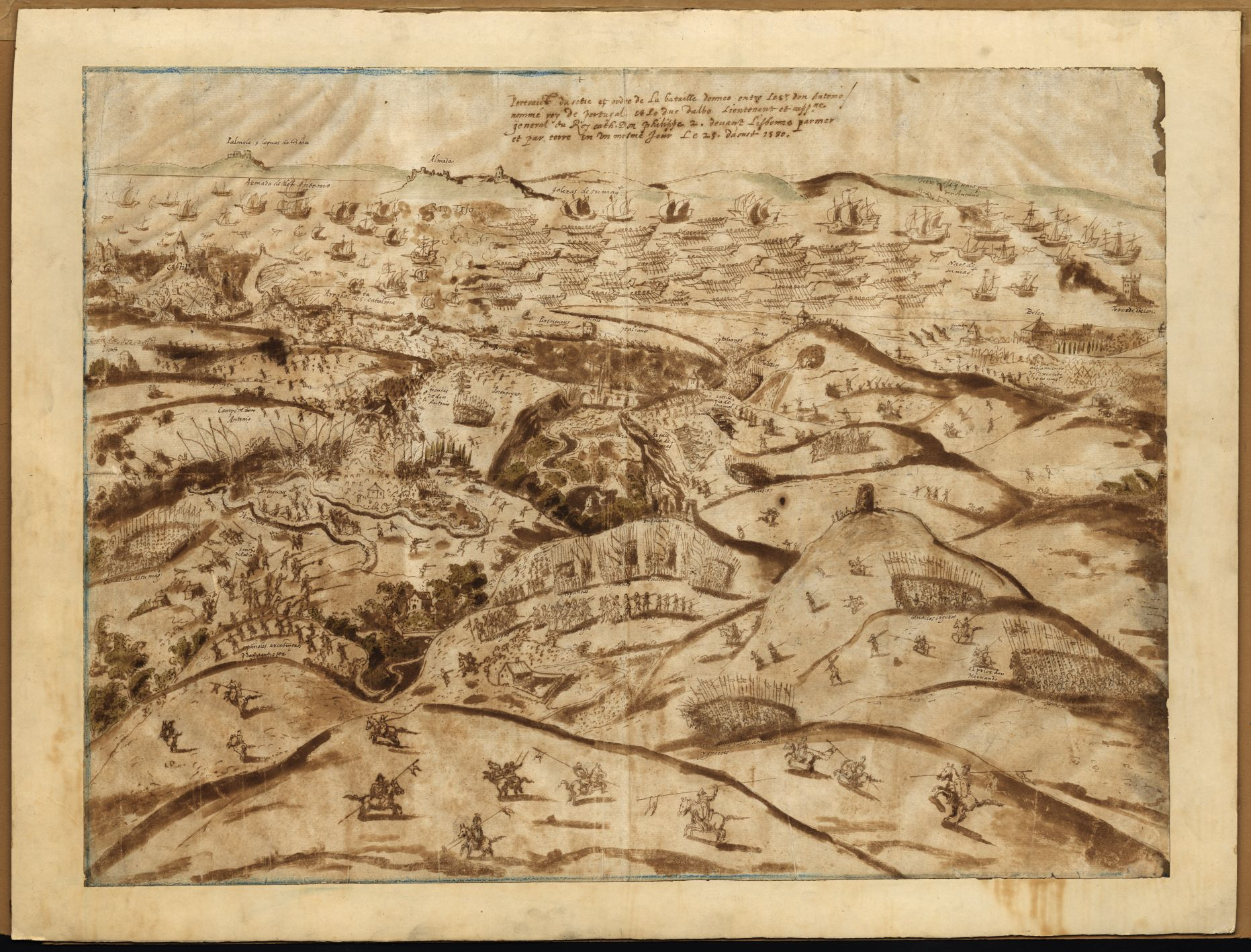 « Portraict du sitie et ordre de La bataille donnee entre Le sr. don Antonio nommé roy de portugal et Le duc dalbe Lieutenant et capp.ne general du Roy cath. Don philippe 2. deuant Lisbonne par mer et par terre en un mesme jour Le 25. d'aoust 1580 ».